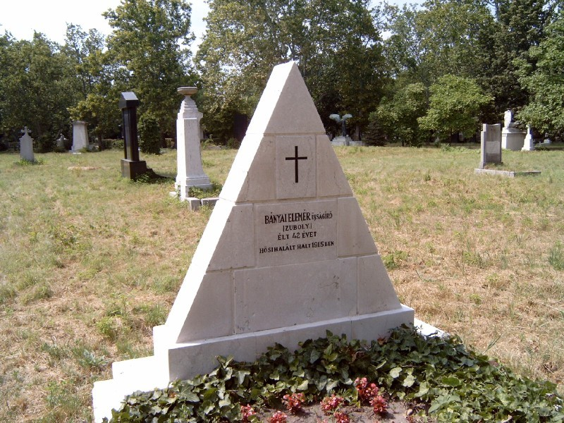 Bányai Elemér (Szamosújvár, 1875. aug. 21. – Oblasce, 1915. ápr. 2.): újságíró, író sírja Budapesten, a Kerepesi temetőben. (Kerepesi temető: 20-1-40).